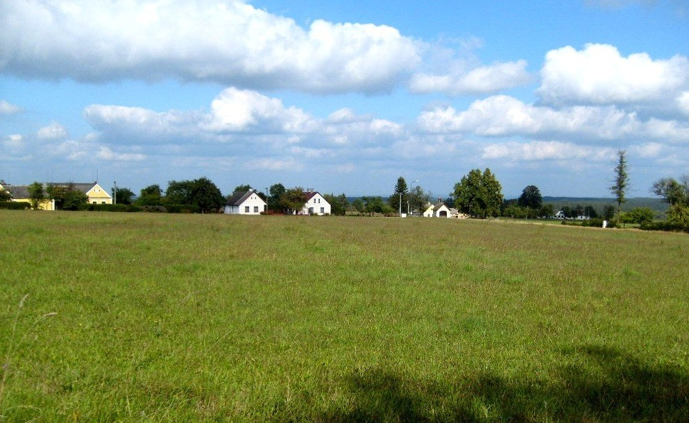 Pohled na osadu.